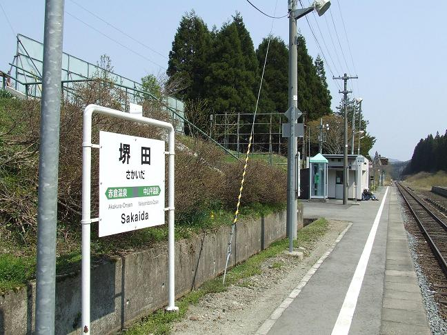 JR堺田駅ホーム